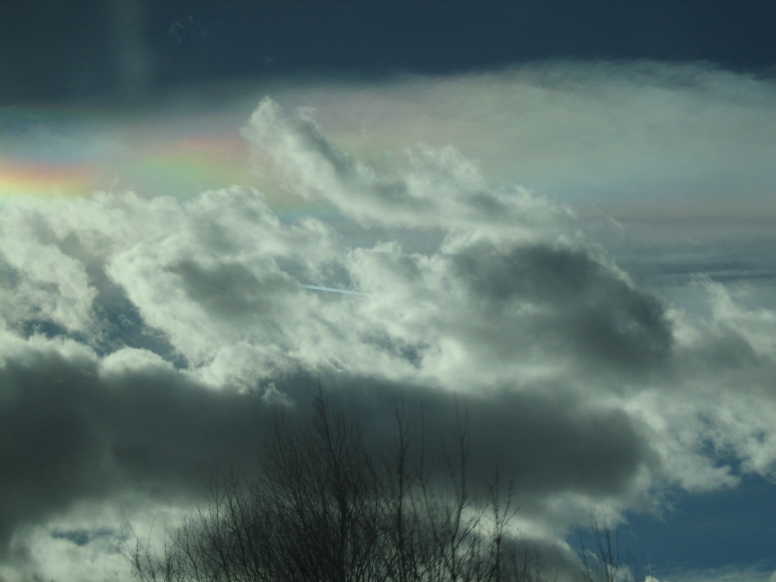 Во время сильной непогоды полеты из Вены были отменены, и желающим проследовать в Грац были предоставлены автобусы. Снимок сделан из автобуса.